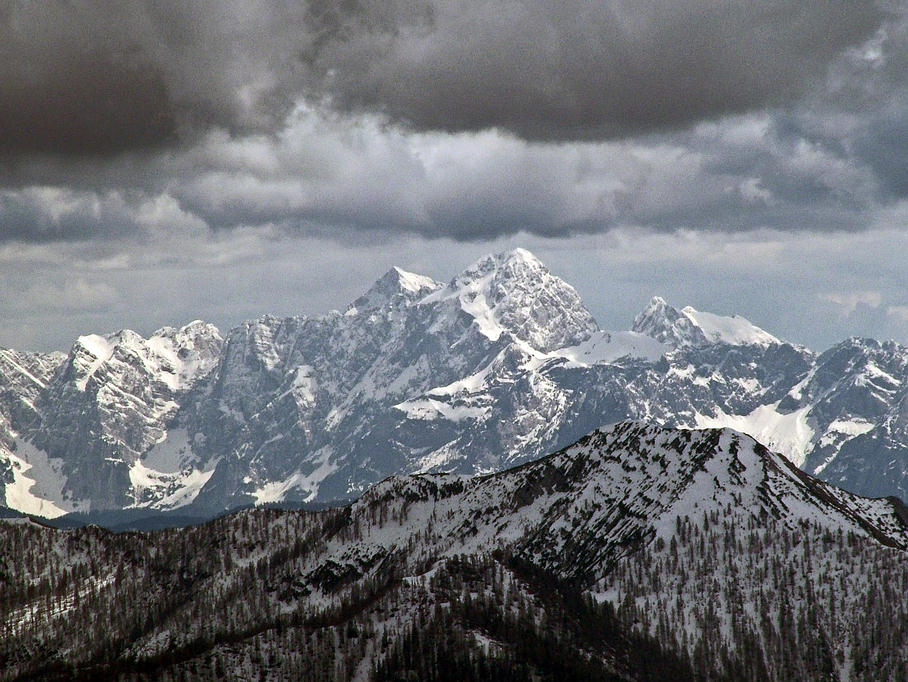 Triglav focený z Gailtalských Alp